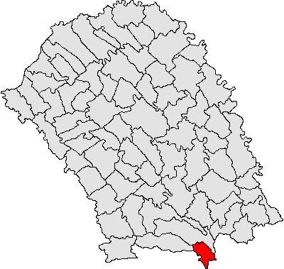 Categorie:Hărţi ale judeţului Botoşani